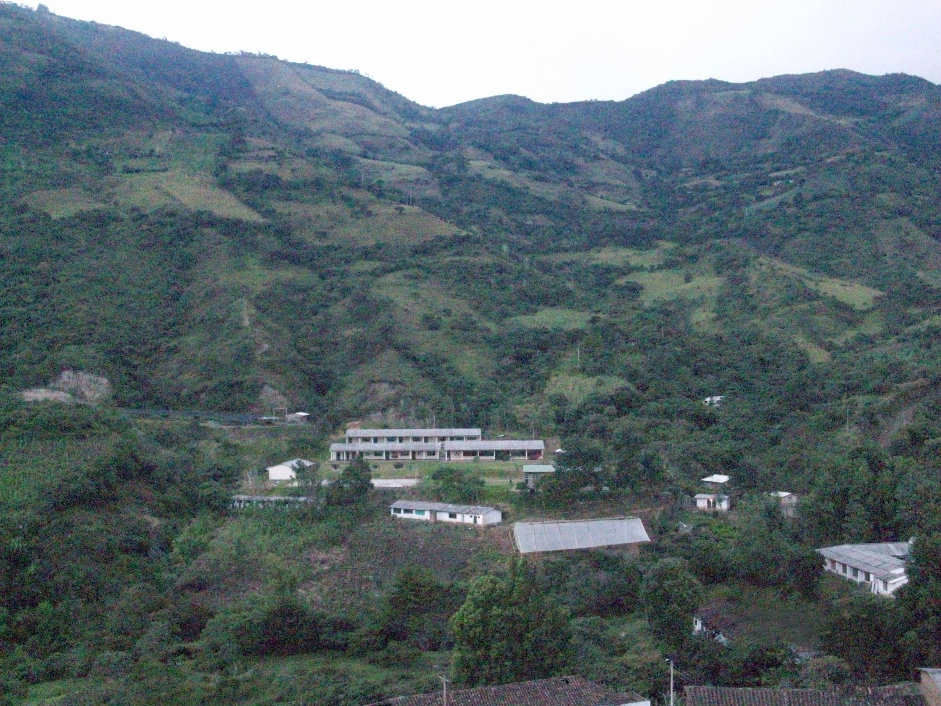 Paisaje del Municipio de San Sebastián Cauca